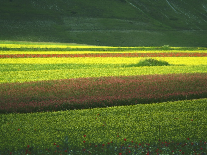 Piana di Castelluccio di NorciaCastelluccio di Norcia